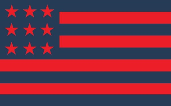 Bandera Oficial del Club Atlético San Lorenzo de Almagro